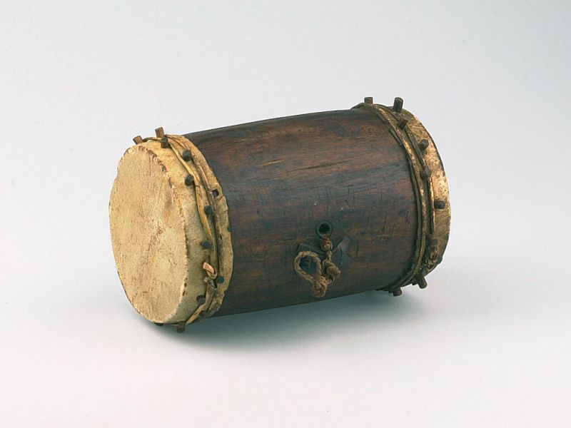 Slaginstrument. De trom wordt met stokjes bespeeld.. Enkelvellige cilindrische trom gemaakt van buffelhuid